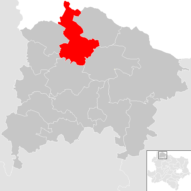 Bezirk Waidhofen an der Thaya